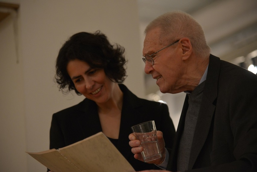 Rajk Judit és Kurtág György.